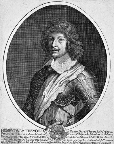 Henri III de la Trémoïlle, duc de Thouars (1598 - 1674) HENRI DE LA TREMOILLE 1er du nom, Duc de Thouars, Pair de France, Prince de Tarente et de Talmond, Comte de Laval, Villefranche, Montfort, Taillebourg, Benon, Guynes et Jonuelles, Vicomte de Rennes et de Bais, Baron de Vitré, Didonne, Berrie et Mauleon, Marquis d'Espinay & Chevalier des ordres du Roy, Fils de Claude de la Trémoille Duc de Thouars, Pair de France, et de Charlotte Brabantine de Nassau fille de Guillaume Prince d'Orange, et de Charlotte de Bourbon Montpensier ; nasquit à Thouars en 1598. Il recueillit en l'année 1605 la succession de la maison de Laval, qui par représentation de Charlotte d'Aragon Princesse de Tarante sa Bizayeulle la rendu seul et unique héritier de Frédéric d'Aragon Roy de Naples et d'Anne de Savoye son espouse, Fille d'Amé Duc de Savoye et d'Iolande de France ; il espousa en 1619 Marie de la Tour D'Auvergne, fille de Henry de la Tour Duc de Bouillon, Prince Souverain de Sedan et d'Elizabet de Nassau.